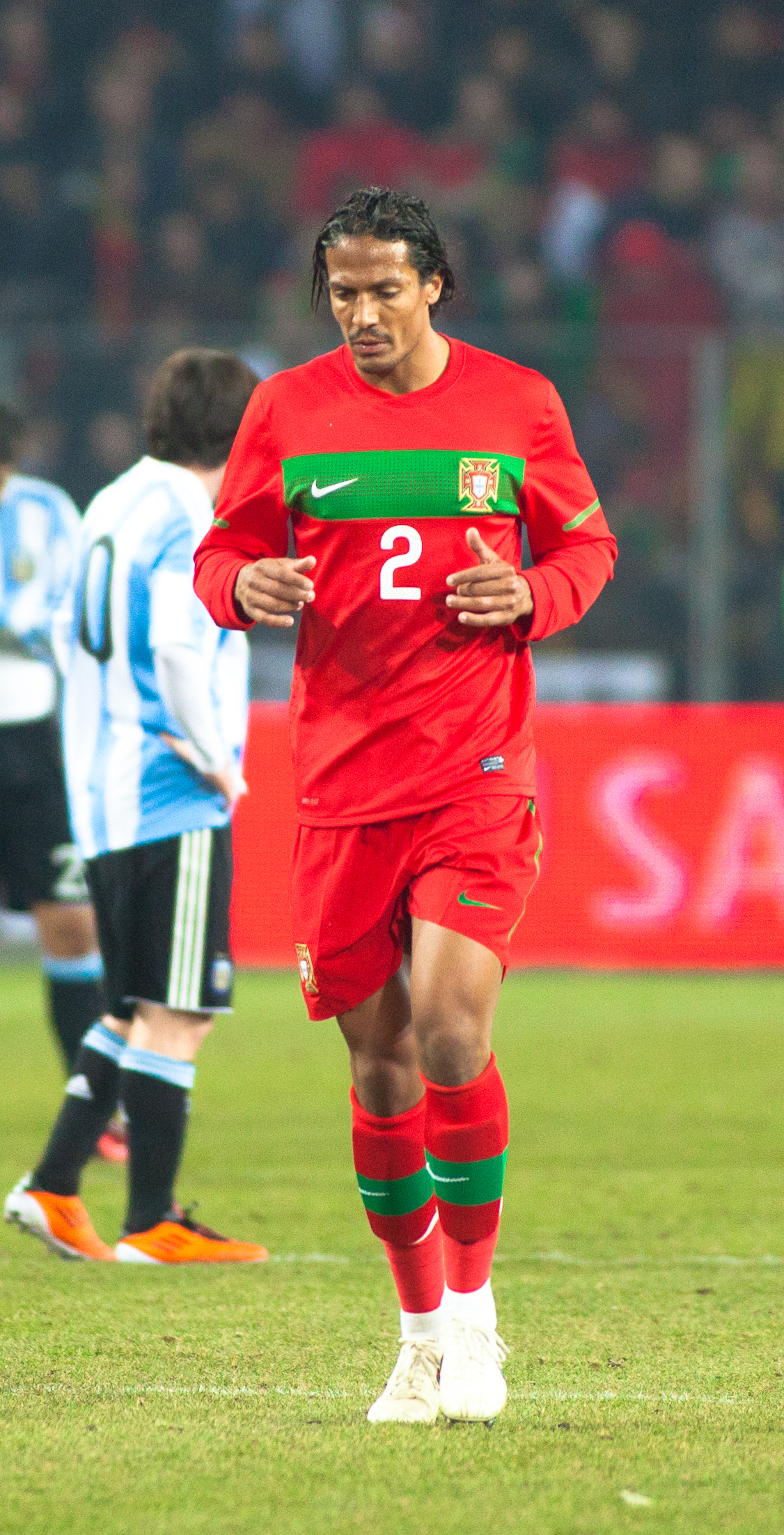 Bruno Alves lors d'un match amical Argentine - Portugal.